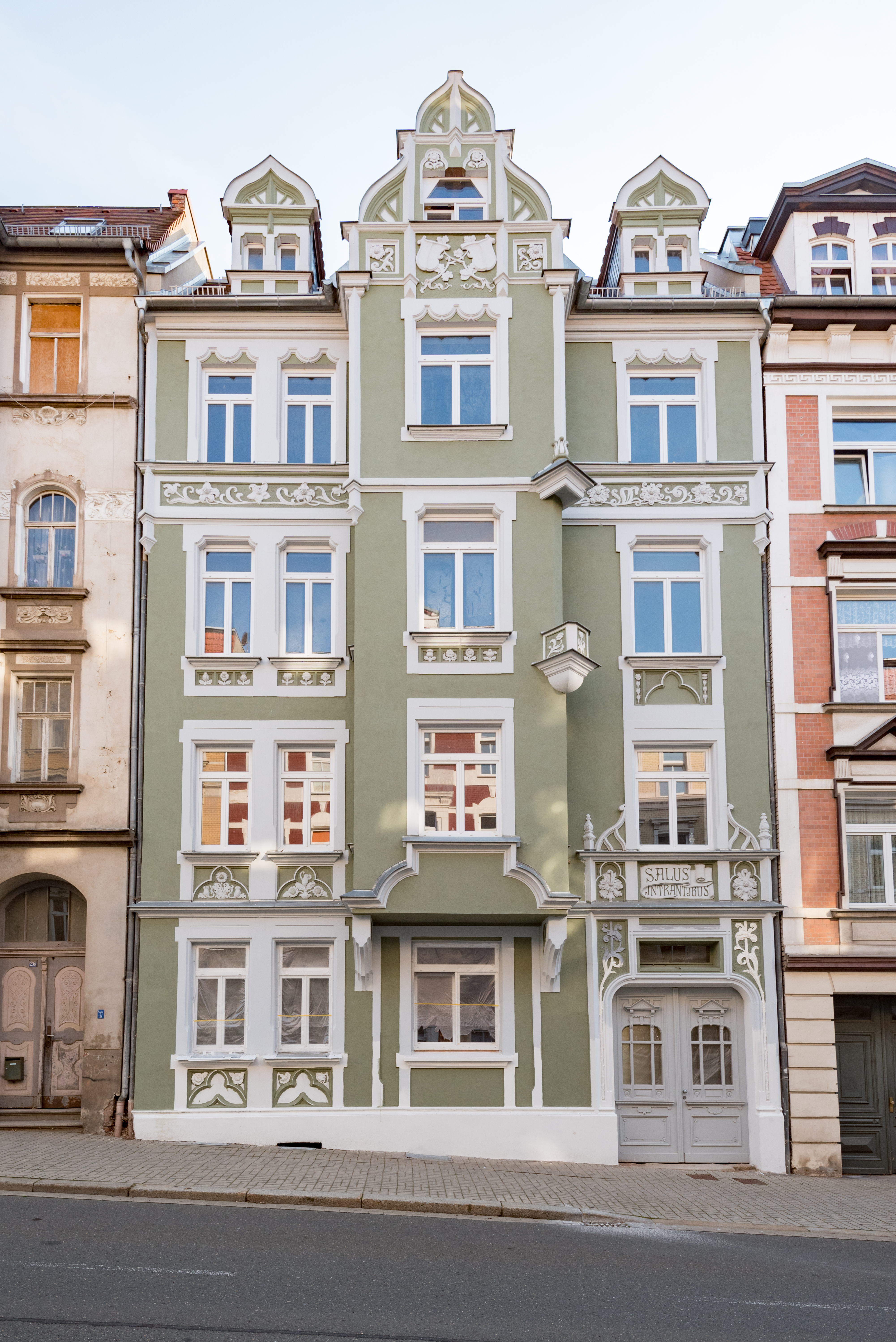 Zeitz, August-Bebel-Straße 24